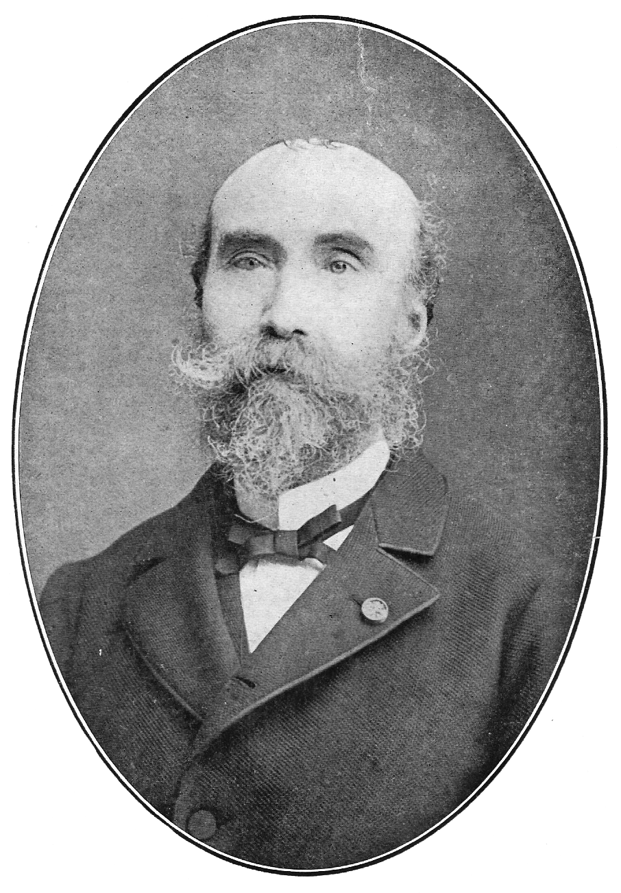 Portrait de Gustave Lefèvre